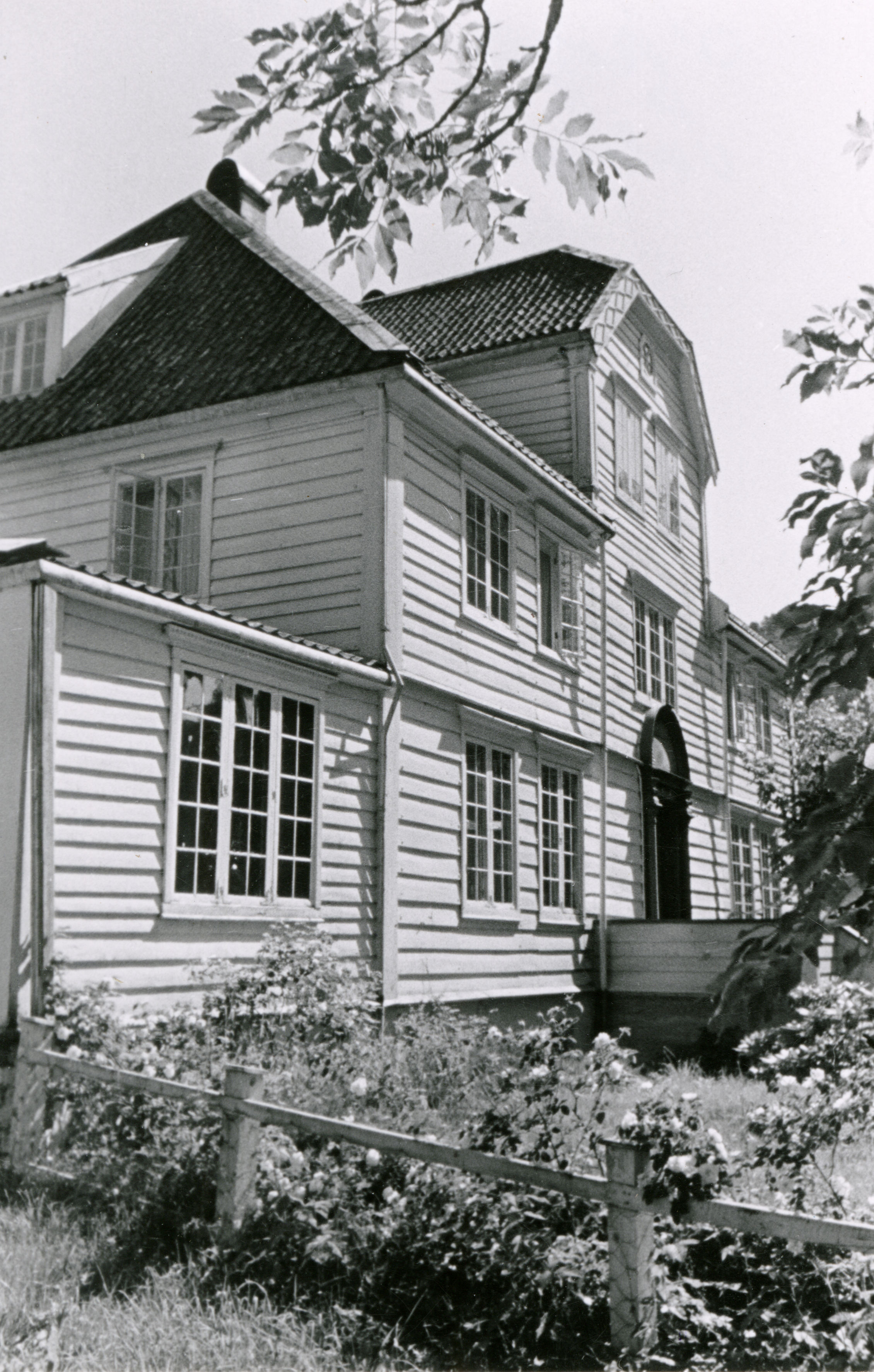 Solnør i Skodje, Møre og Romsdal